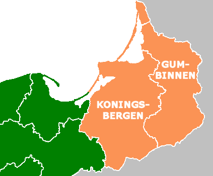 Regierungsbezirke in Oost-Pruisen 1878